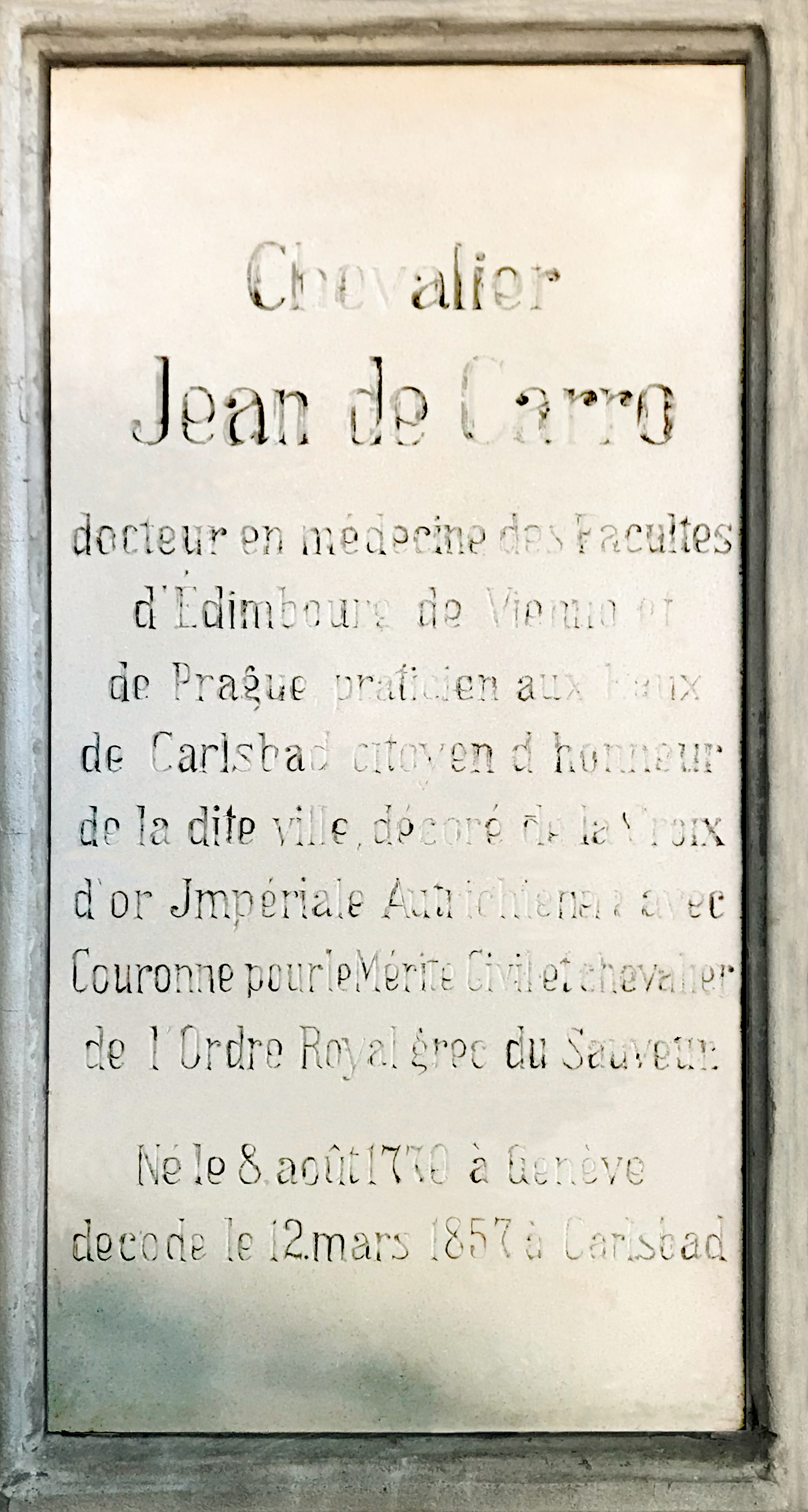 Deska na hrobě Jeana de Carro v Karlových Varech v Mozartových sadech u zdi kostela sv. Ondřeje